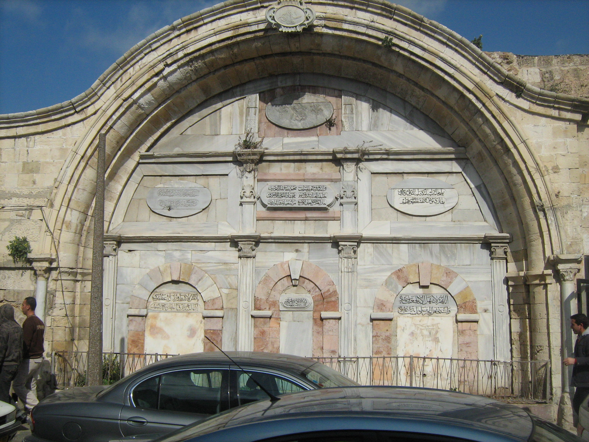 מסגד מחמודיה ביפו